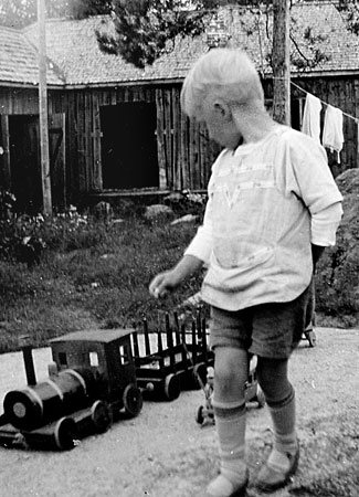 Kansanedustaja (1962–1975), Helsingin kaupunginjohtaja (1979–1991) Raimo Ilaskivi lapsena. Kuvassa Ilaskiven isän tekemä puujuna.